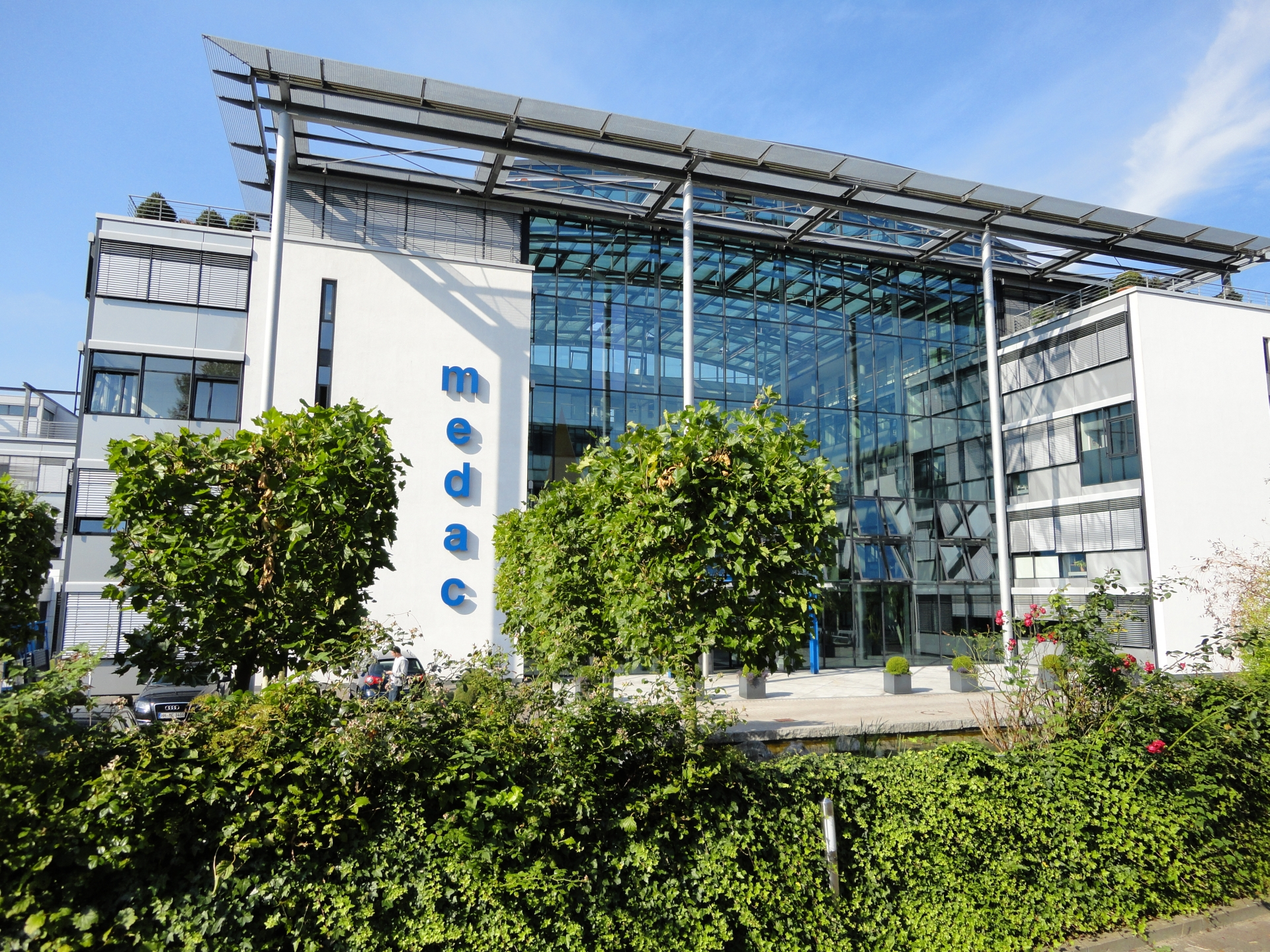 medac Hauptgebäude in Wedel